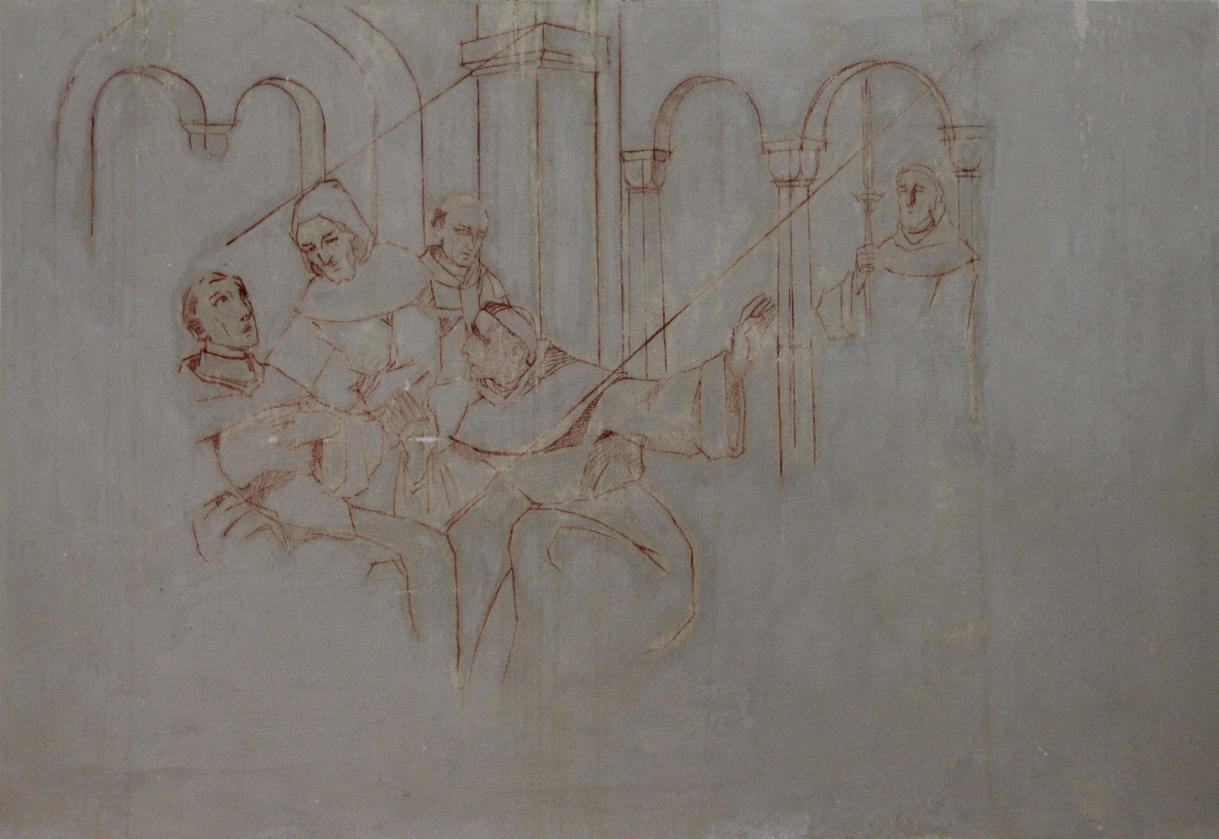 nedokončený obraz „Smrt sv. Antonína“ od Jana Köhlera z roku 1937 v kněžišti kaple sv. Antonína Paduánského na Antonínském kopci (mezi Blatnicí pod Svatým Antonínkem a Ostrožskou Lhotou); dokončení malby zabránila umělcova smrtelná nemoc